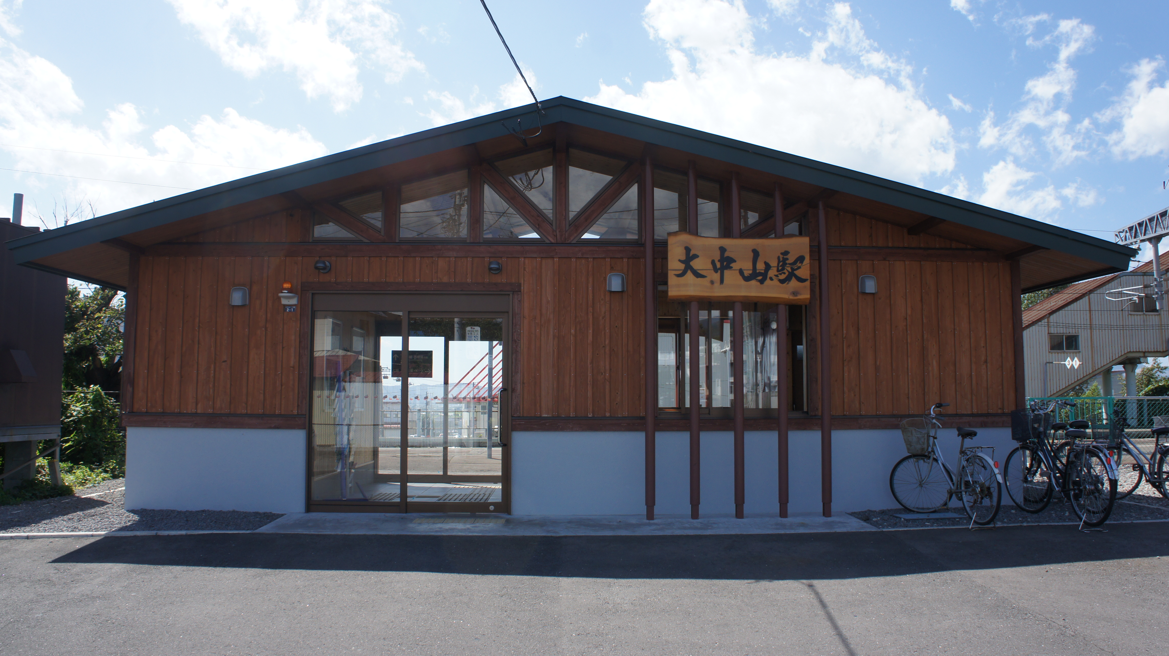 JR函館本線・大中山駅の駅舎 Sony NEX-3